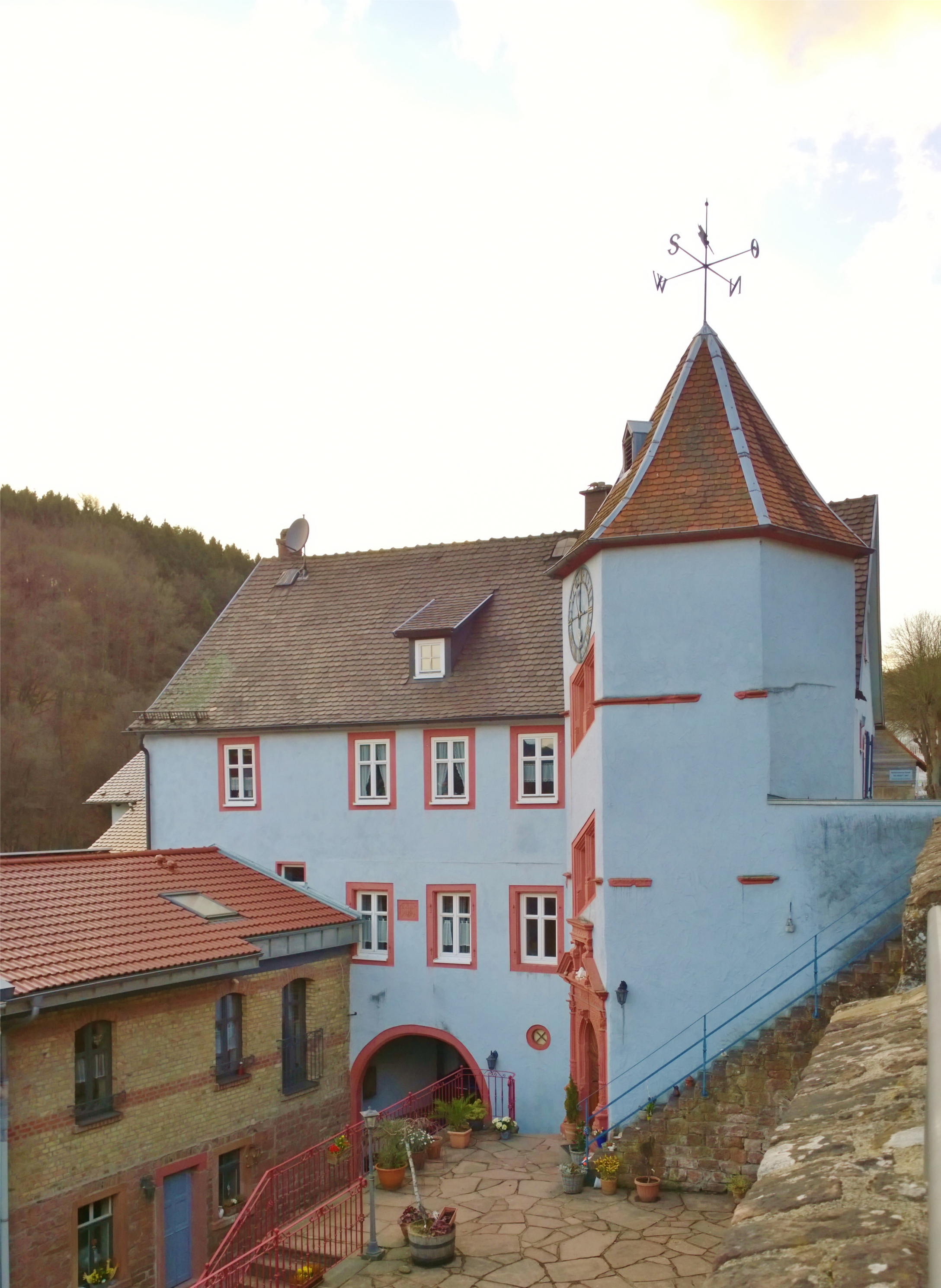 Wald-Michelbach: Hammerschlösschen, Zustand März 2015, Blick von Süden (Staße)